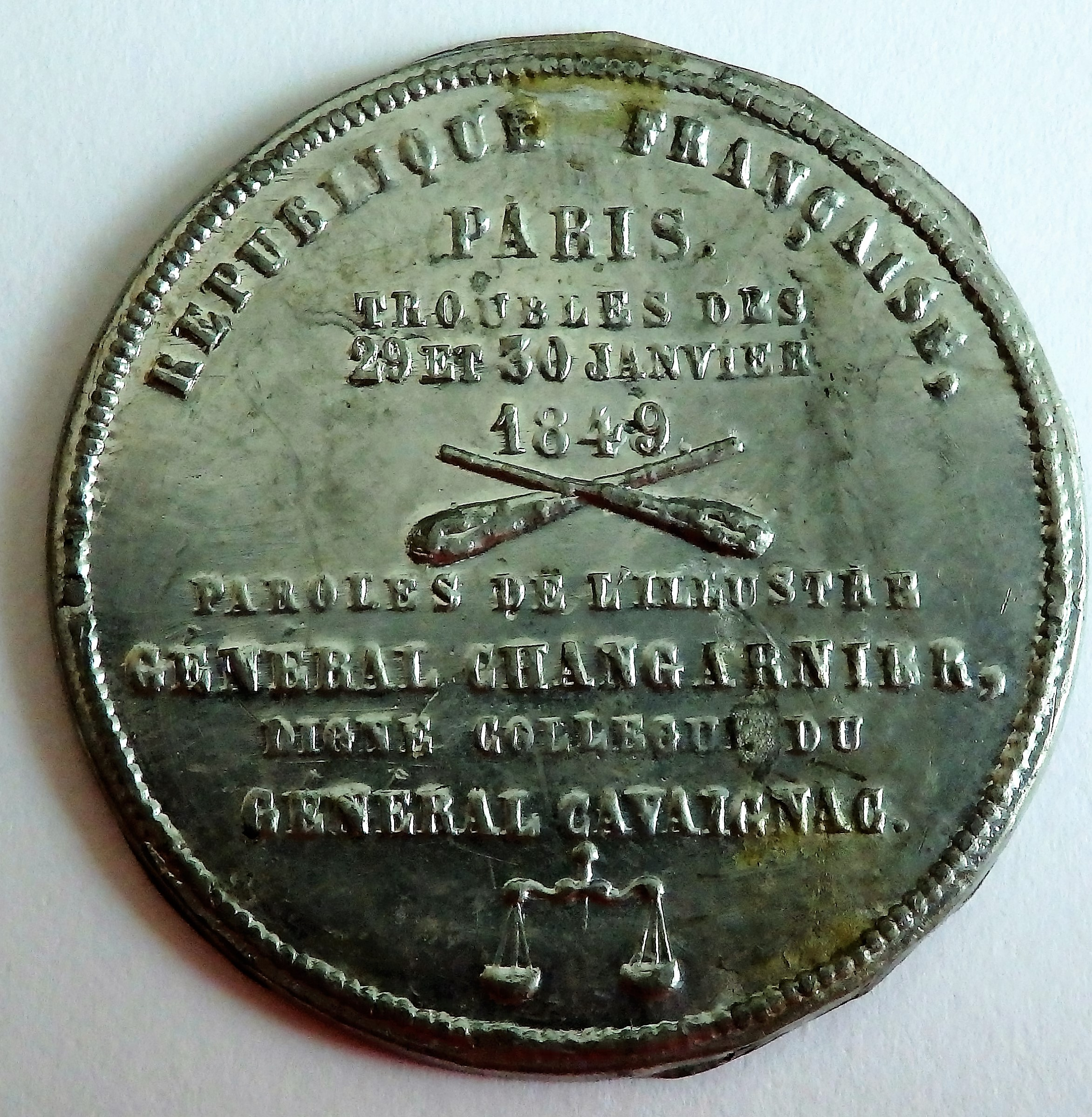 Medaille auf die Niederschlagung des sozialistischen Aufstandes in Paris vom 29./30. Januar 1849, Avers